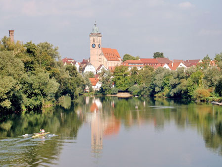 Nürtingen, Nuertingen, von der Wörthbrücke aus gesehen